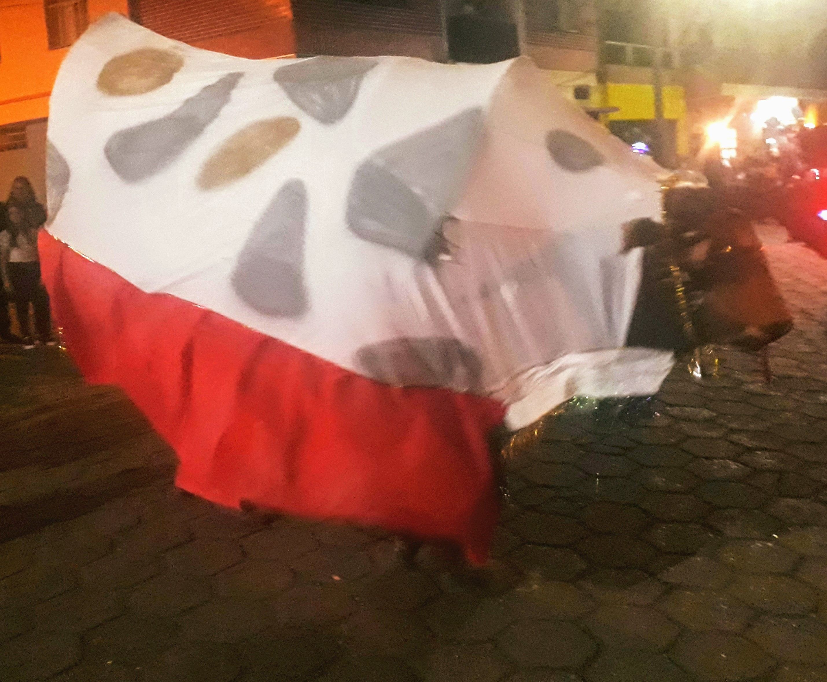 Carnaval de Tibagi, no Paraná.